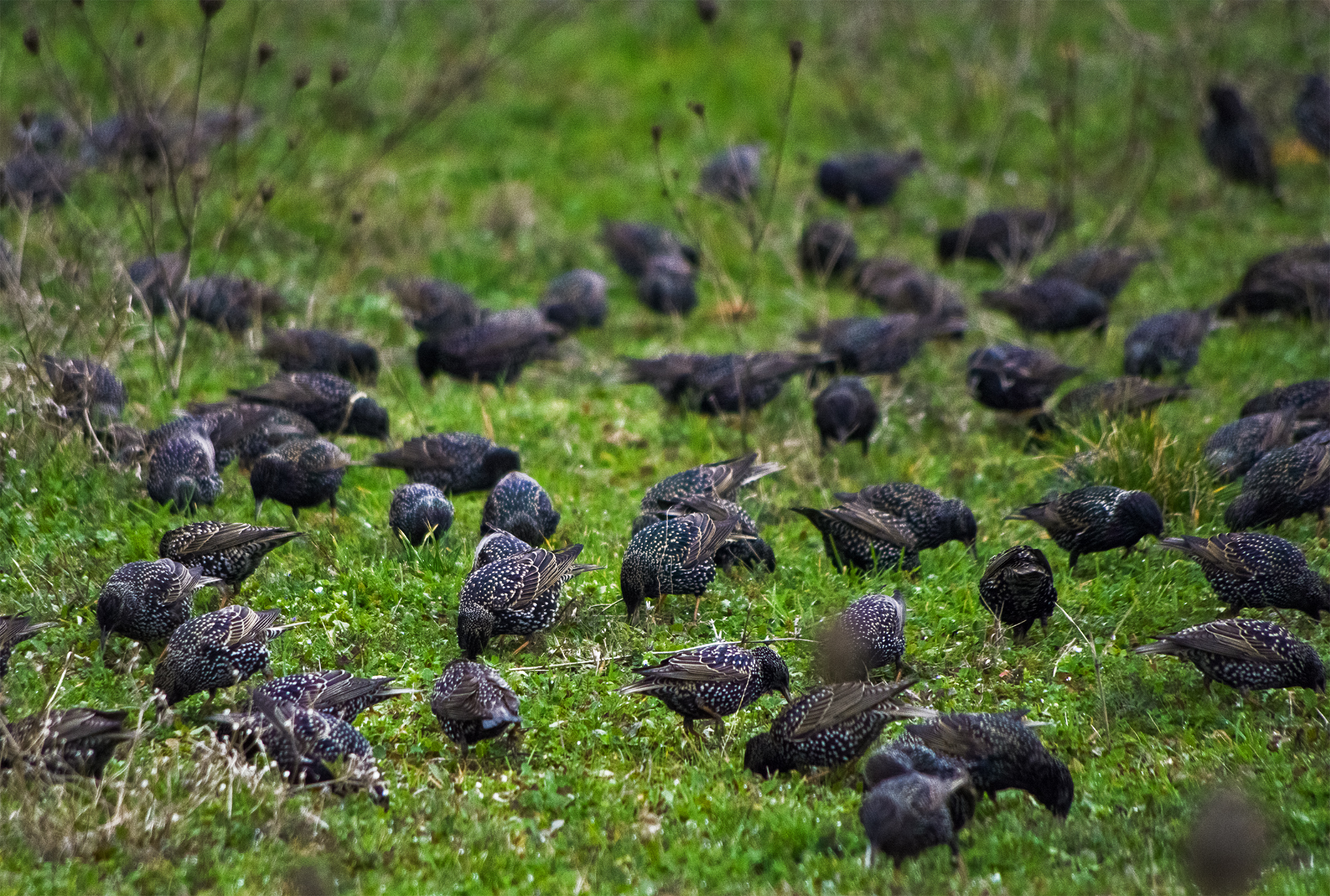 starlings / скворцы